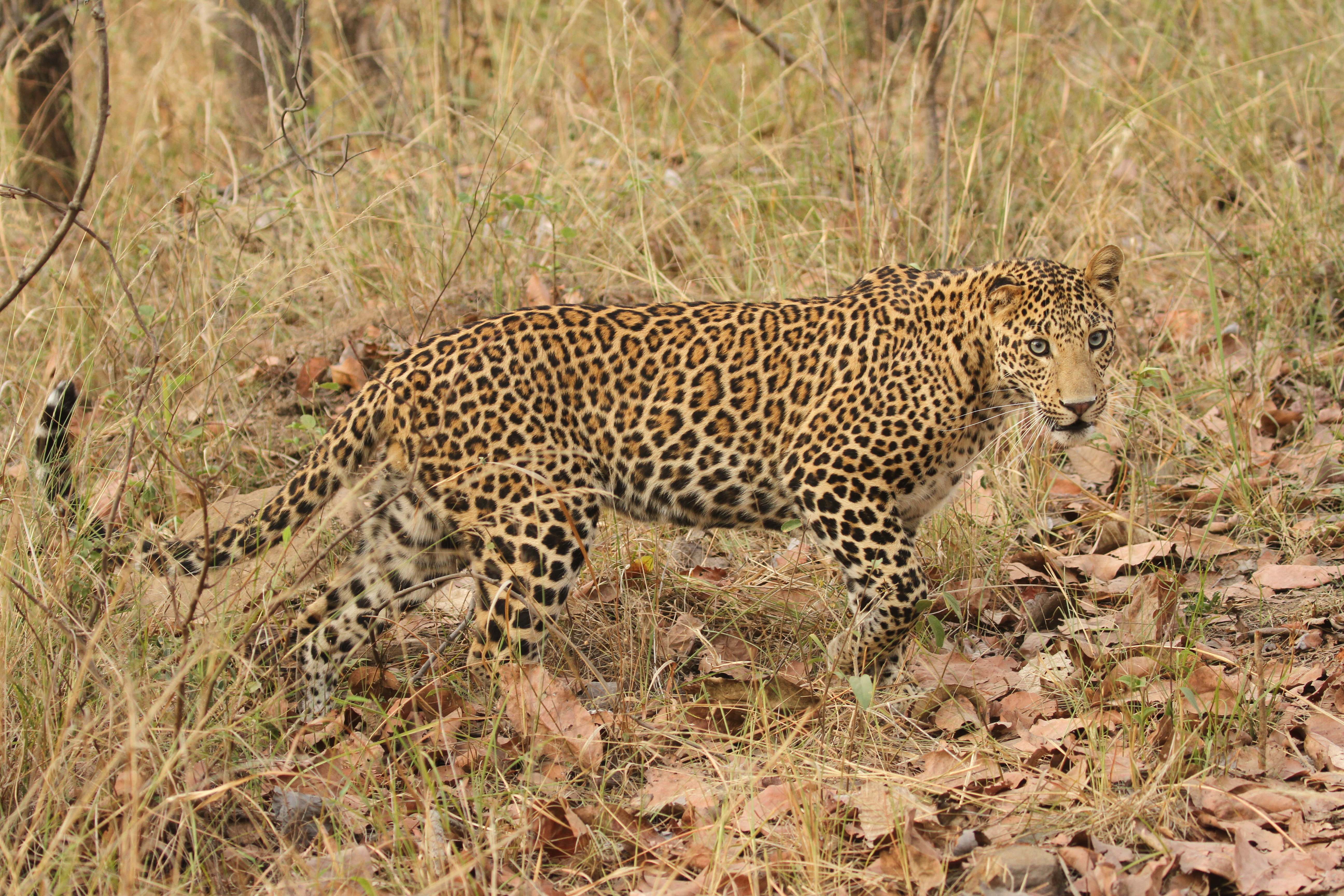 Leopard from central India